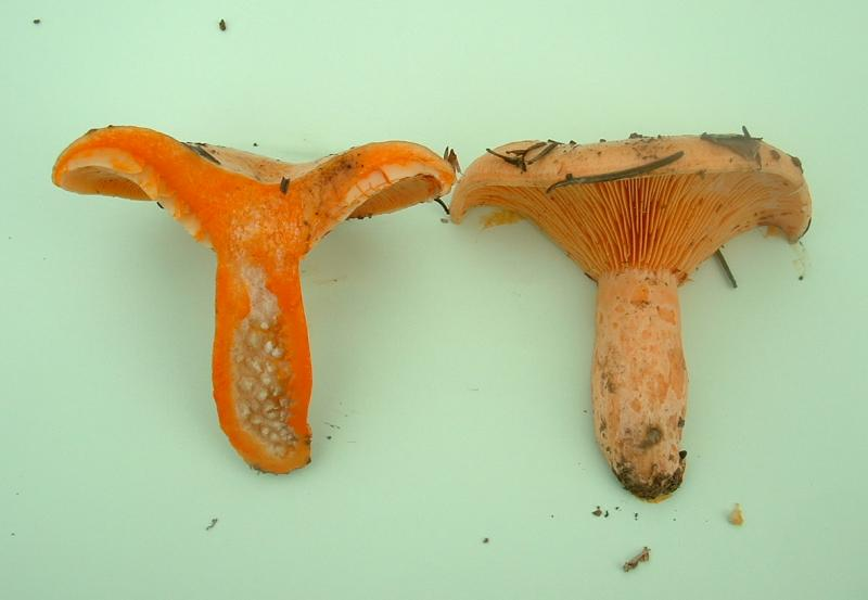 Lactaire couleur de saumon, Gy (Haute-Saône)